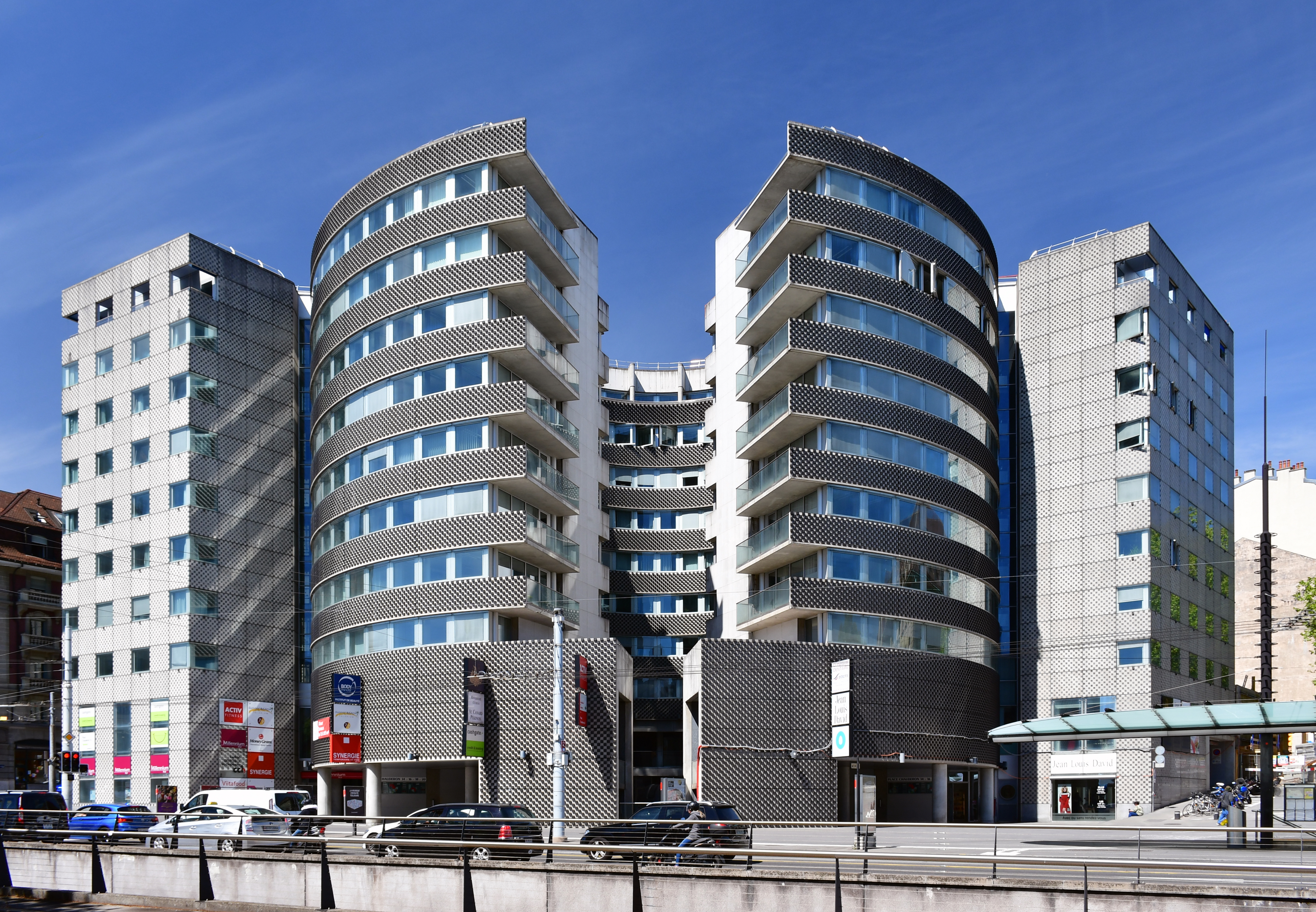 Ulysse, bâtiment d'Aurelio Galfetti situé à la place Chauderon (Lausanne, Suisse).